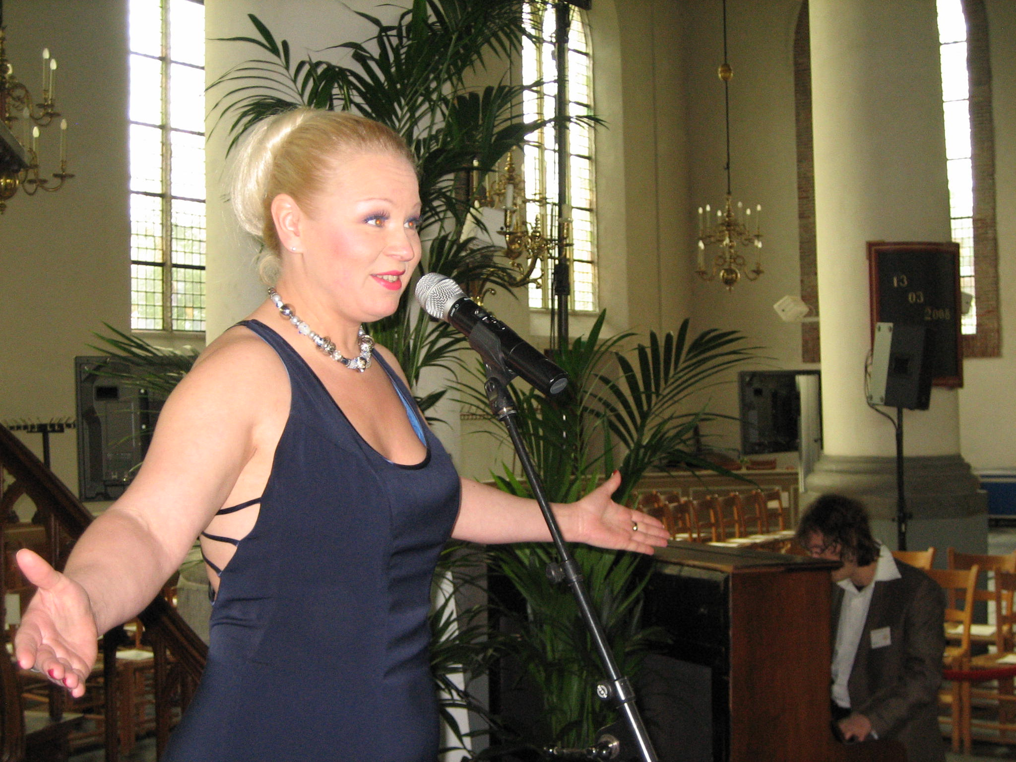 Pauliina May Geuzen-mitalin jakotilaisuudessa Vlaardingenin kirkossa Hollannissa.